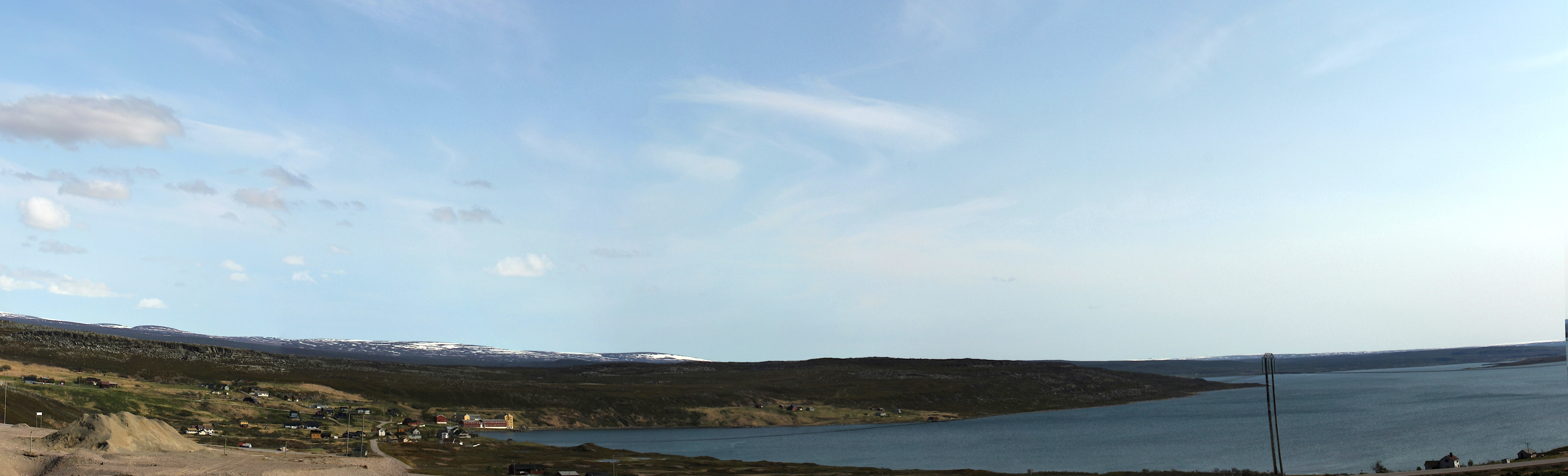 Karlebotn